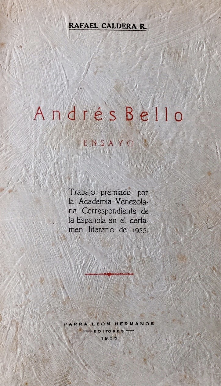 Portada de la primera edición de la biografía de Andrés Bello por Rafael Caldera. Publicada por Parra León Hermanos Editores, 1935.